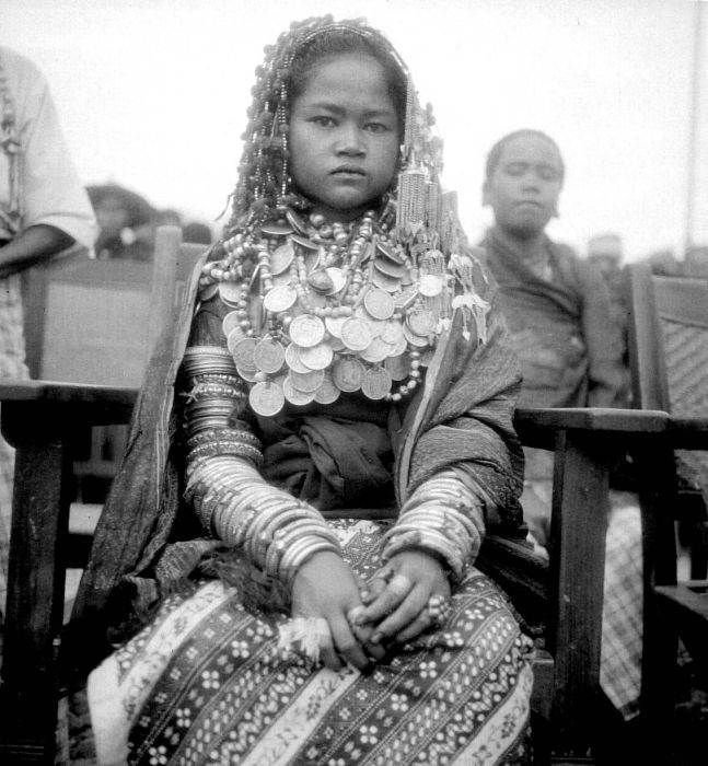 Seorang pengantin muda Gayo, Sumatra bagian Utara